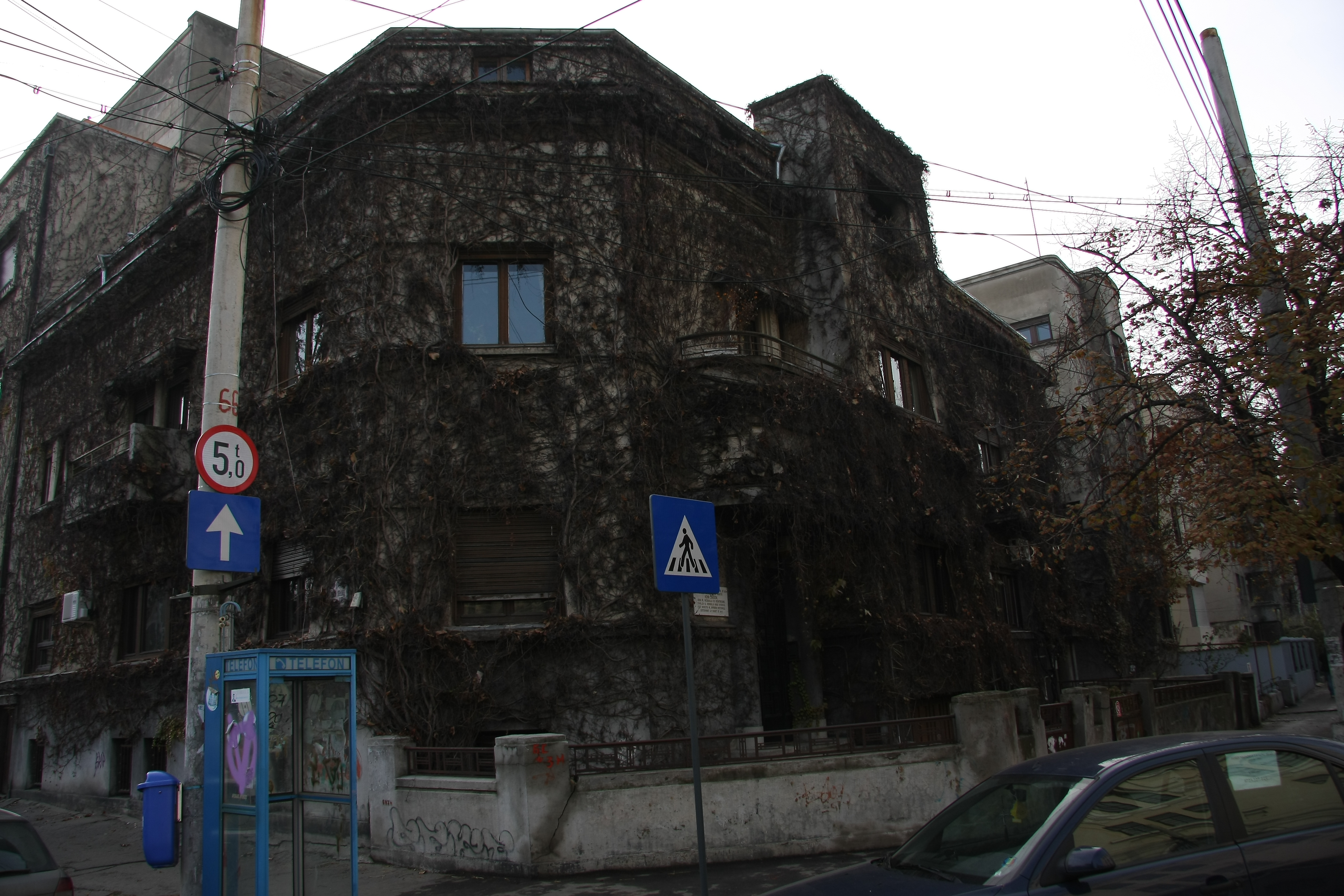 Casa unde a trăit gen. Henri Cihoski